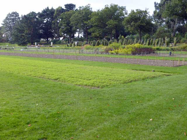 Hortikulturelles Versuchsfeld, RHS Wisley